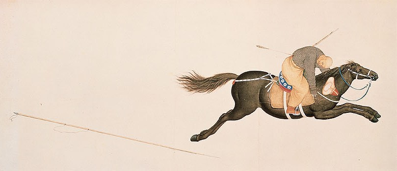 "Уйгурский воин", фрагмент картины Кастильоне "Мацан третьей стрелой убивает врага